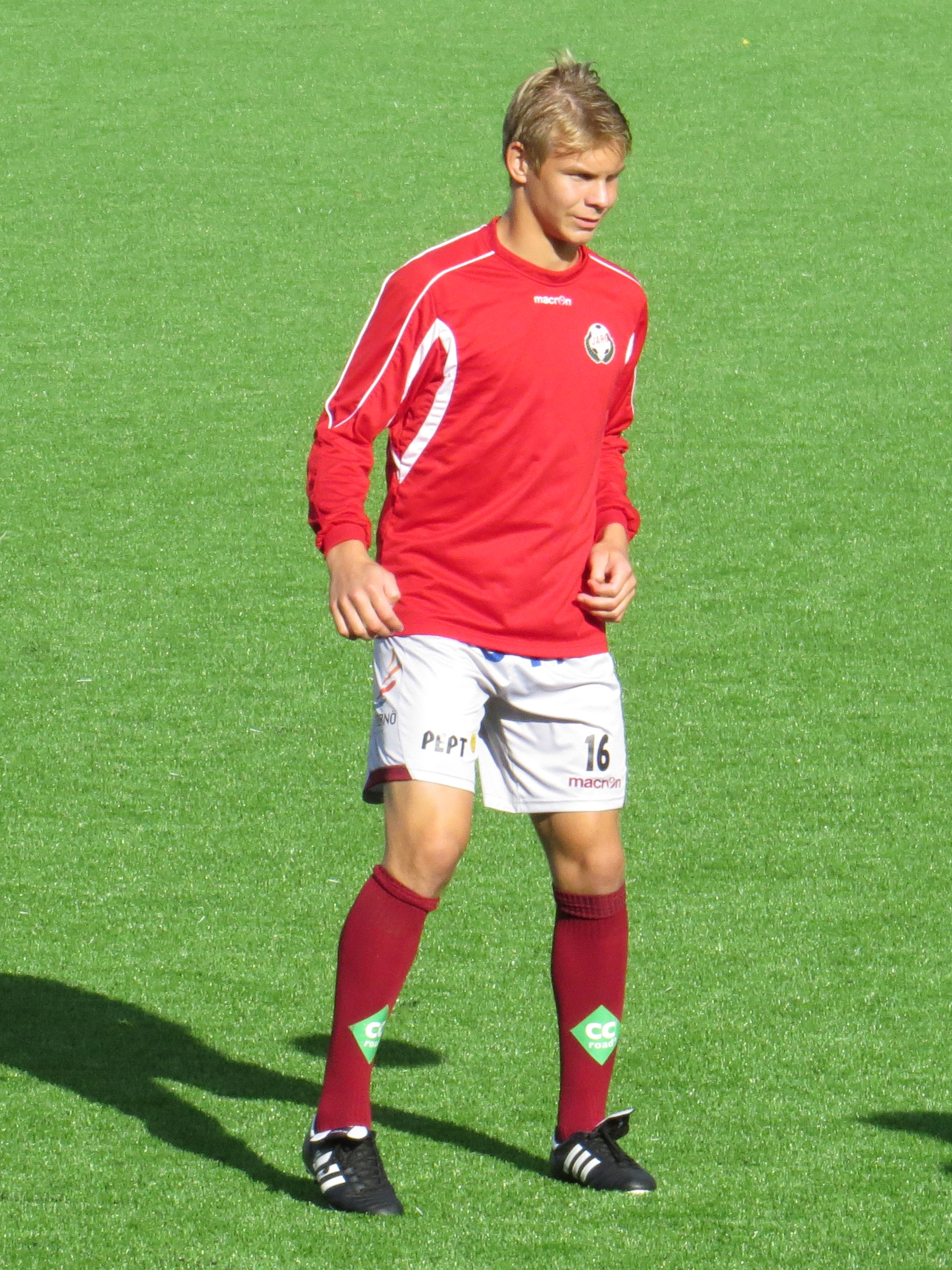 Adam Vidjeskog, suomalainen jalkapalloilija FF Jaron joukkueessa kaudella 2015.